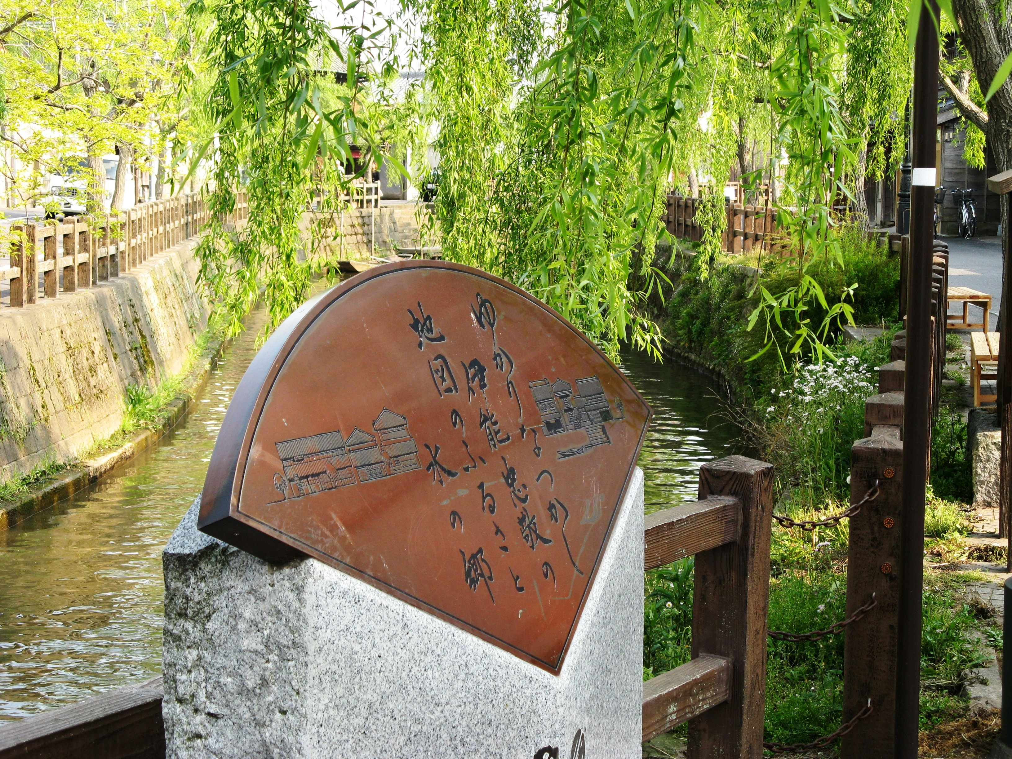 小野川沿いにある記念碑。千葉県香取市。